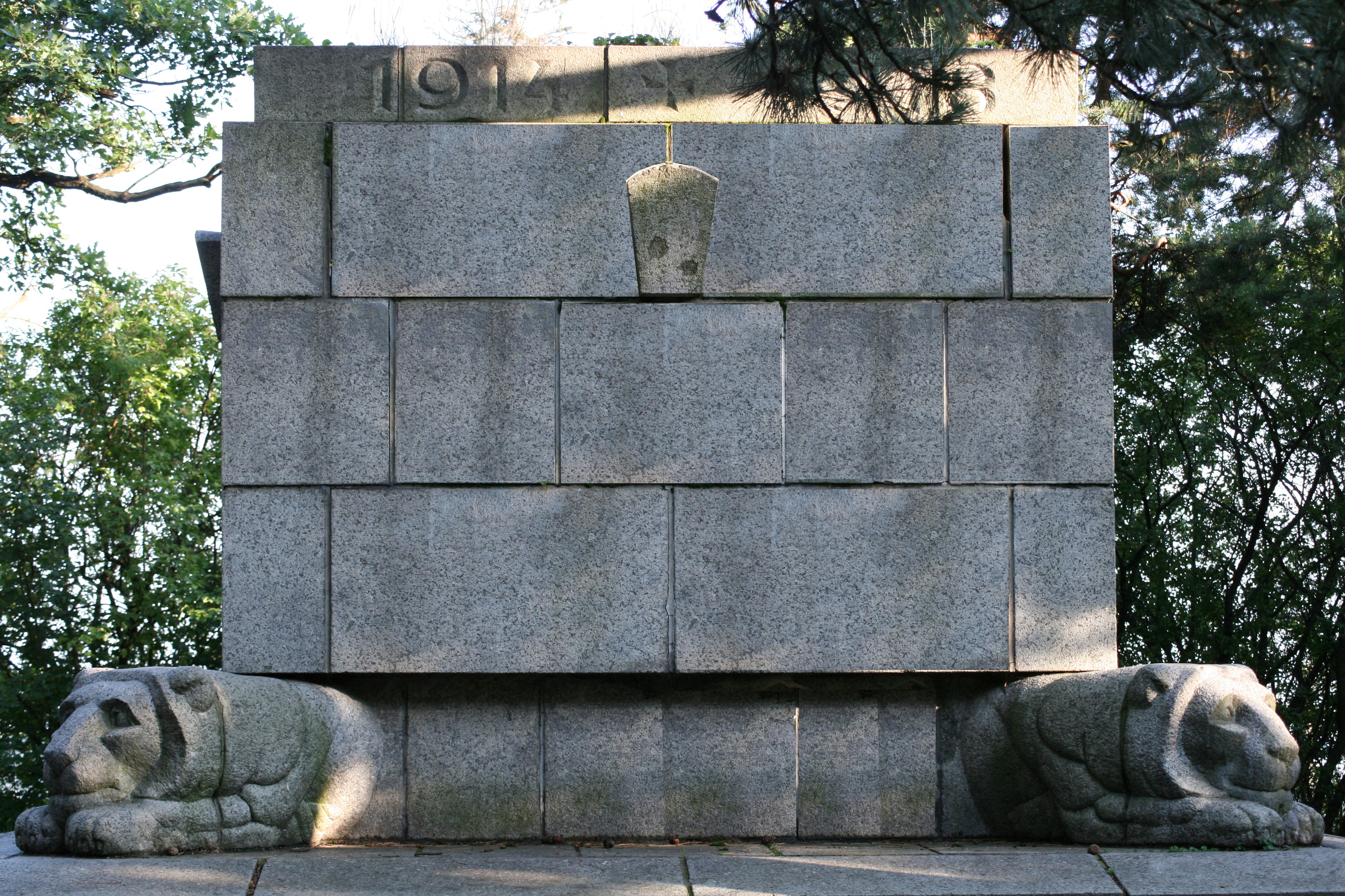 V blízkosti Slavína, na ulici Francúzskych partizánov (návrší Murman), je pamätník venovaný obetiam prvej svetovej vojny v tvare veľkého kamenného sarkofágu postaveného na chrbtoch levov. Monument (asi 220 cm vysoký) je z granitu a s letopočtom 1914 – 1918. Kedysi pamätné a veľmi navštevované miesto je dnes neudržiavané, spustnuté a zabudnuté.